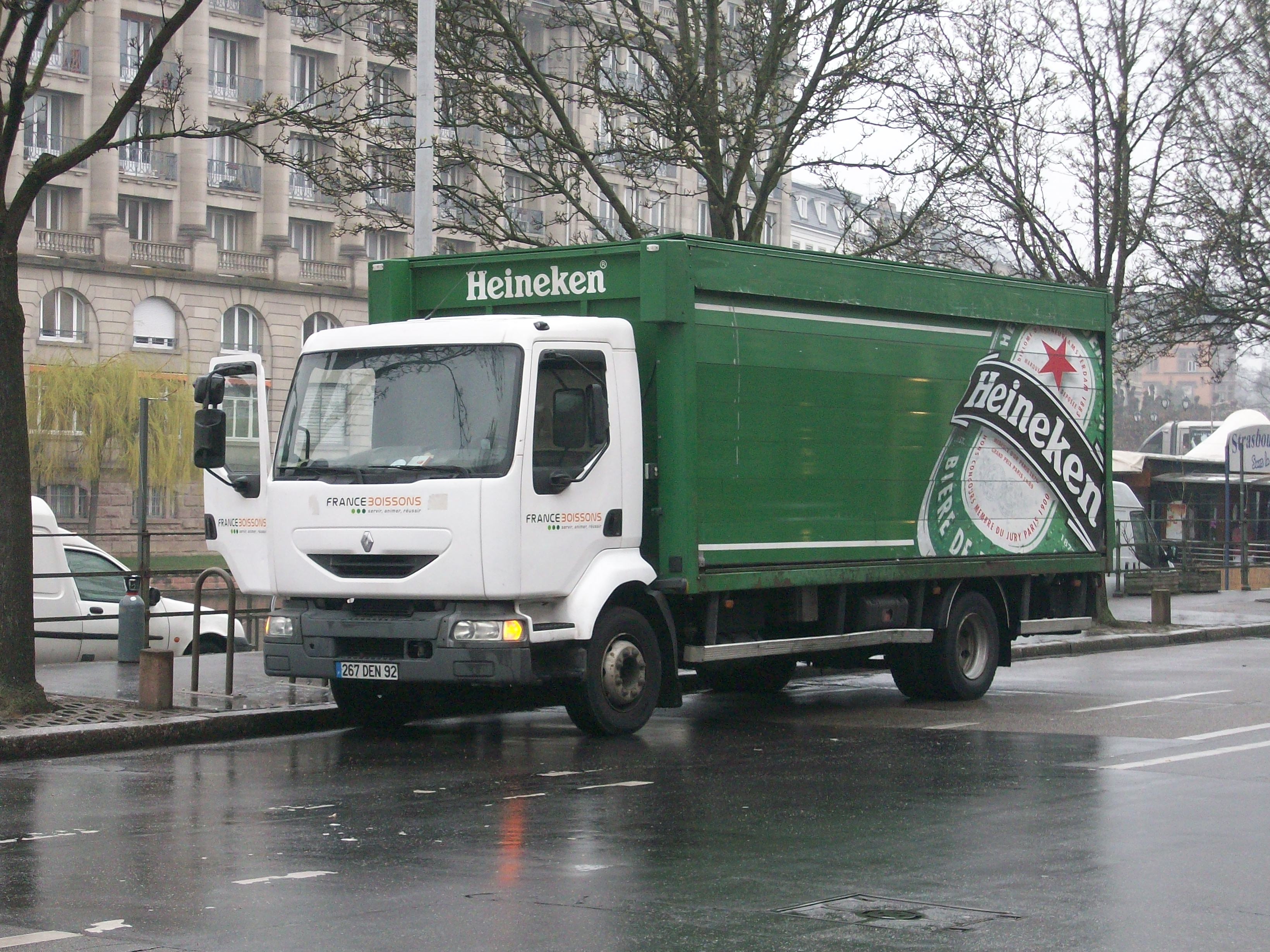 Renault Midlum France Boissons aux couleurs de Heineken à Strasbourg